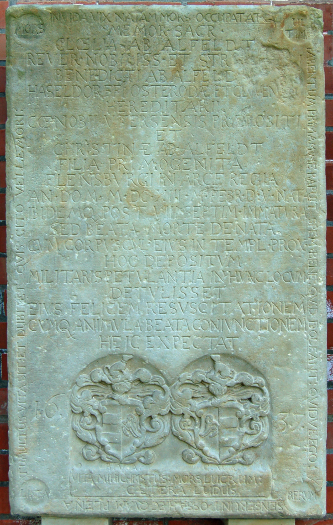 Grabplatte von Benedict von Ahlefeldt (1593–1634)